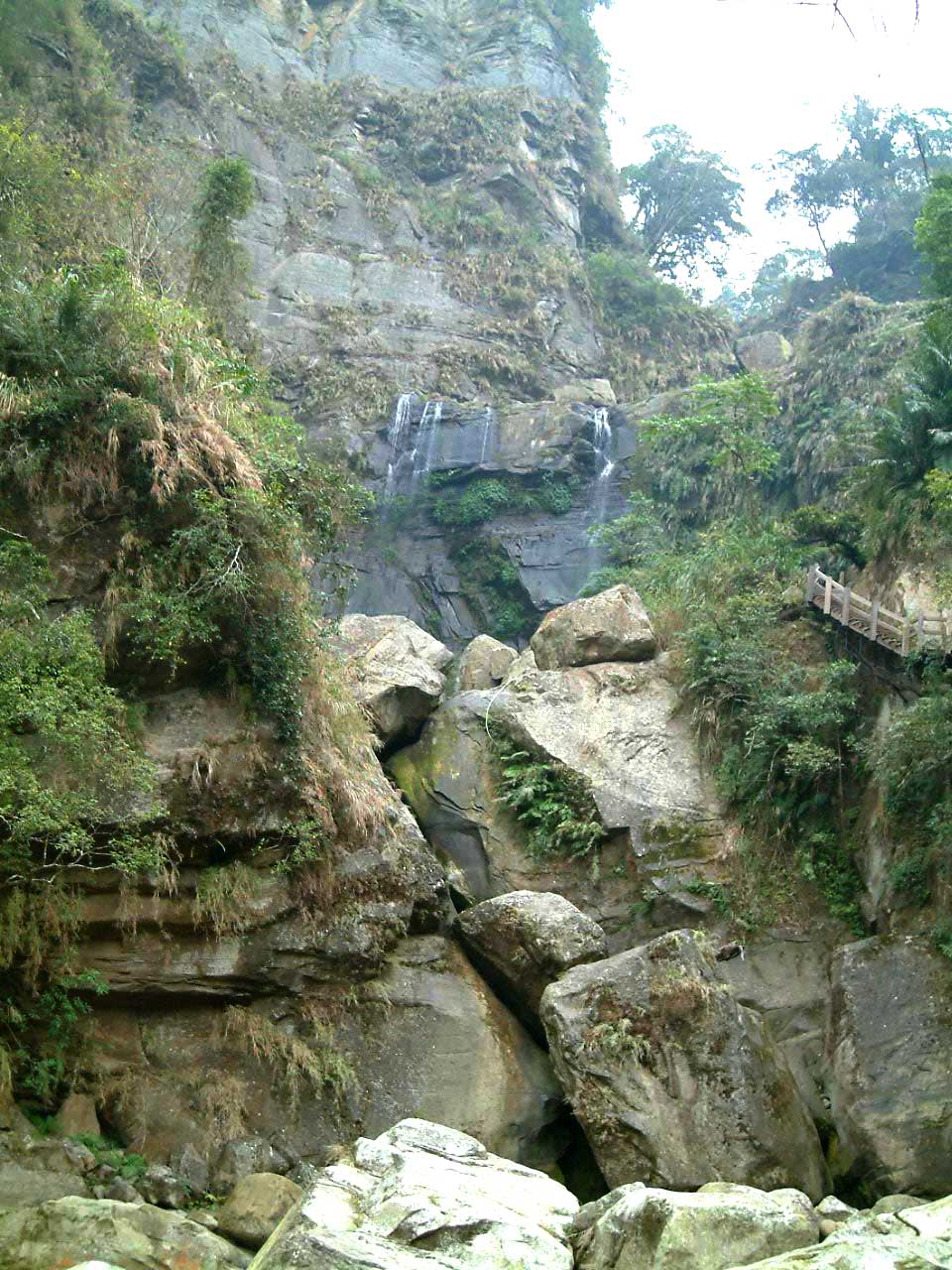 雲潭瀑布中、下層，落差分別為60公尺、15公尺。